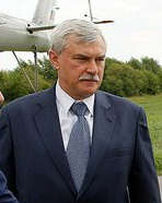 Георгий Полтавченко